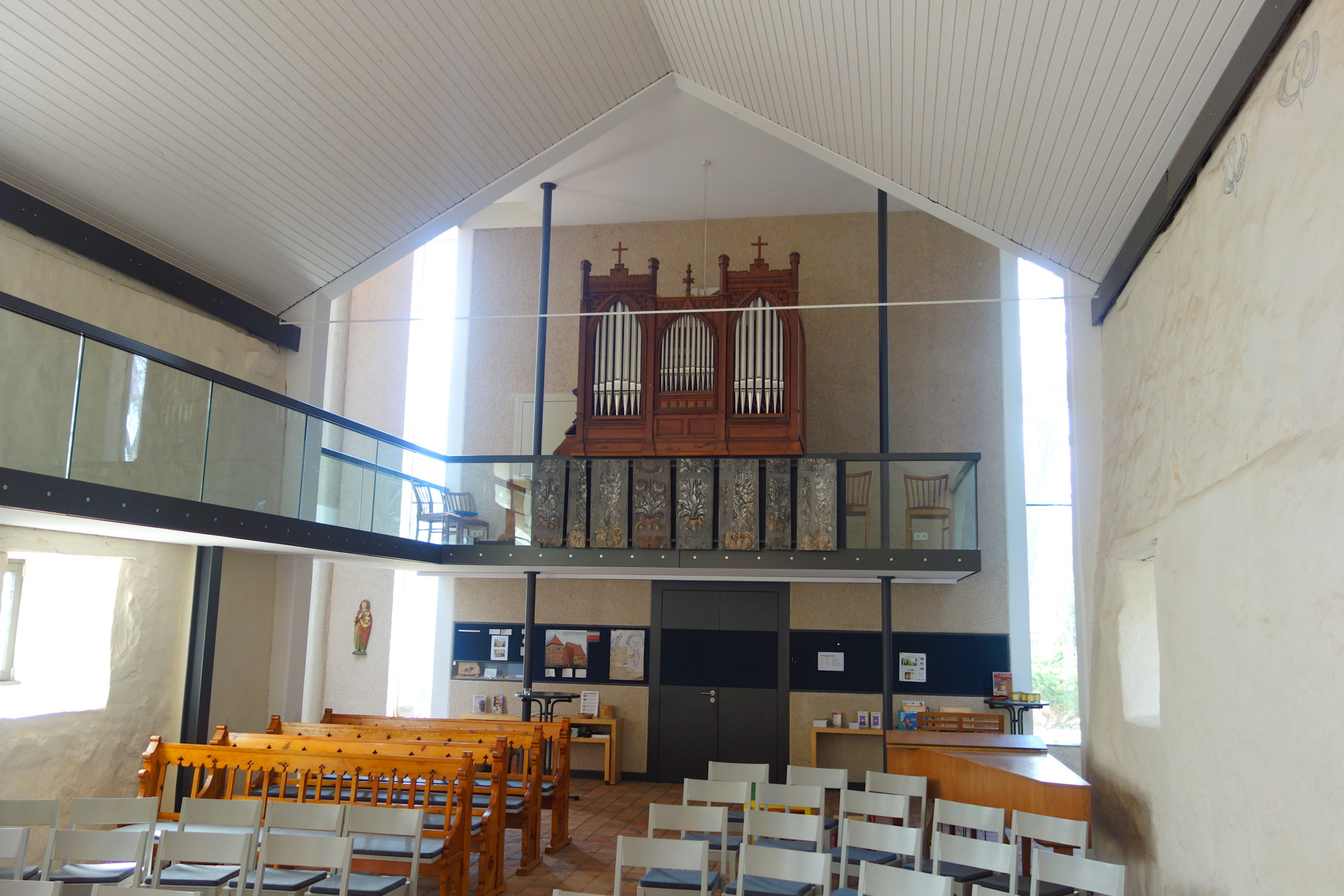 Orgel der Kirche Barkow, Landkreis Ludwigslust-Parchim, Deutschland